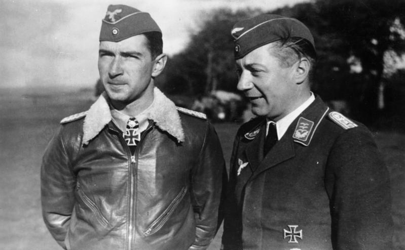 Major Mölders mit seinem "z.b.V." Hauptmann Laumann PK-Dreesen Scherl Bilderdienst 8813-40 "Fr" OLF